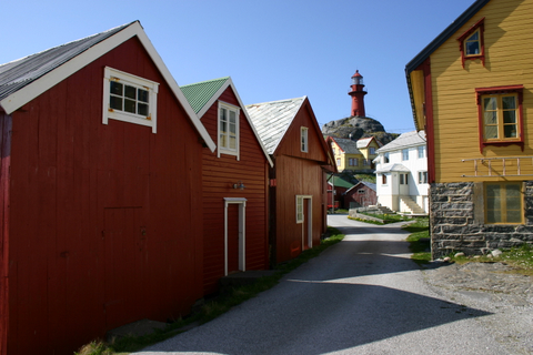 Fiskeværet Ona, med Ona fyr øverst på Onakalven